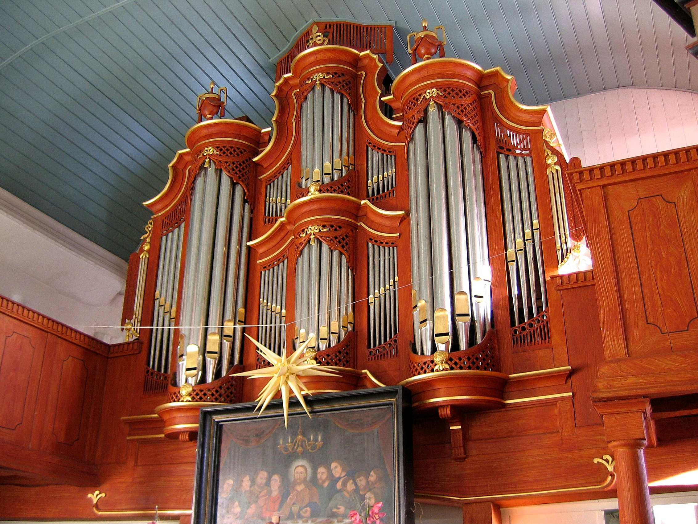 Orgel in Holtland, Landkreis Leer